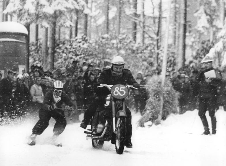 Zentralbild Gahlbeck 28.1.63 Skijöring im Erzgebirge überaus beliebt Mit dem vierten Lauf am 27.1.1963 in Augustusburg tritt die Bestenermittlung des Bezirkes Karl-Marx-Stadt im Skijöring in ihr entscheidendes Stadium. Drei Wertungsläufe wurden bereits in den Erzgebirgsgemeinden Geyer, Satzung und Scheibenberg ausgetragen. Seit etwa 13 Jahren gehört diese Wintersportart zu einem festen Bestandteil des Sportprogrammes im Erzgebirge. UBz: In toller Fahrt sausen Joachim Riedel mit seinem Hintermann Heinz Rösch (Start Nr. 85) über die Schneefläche.